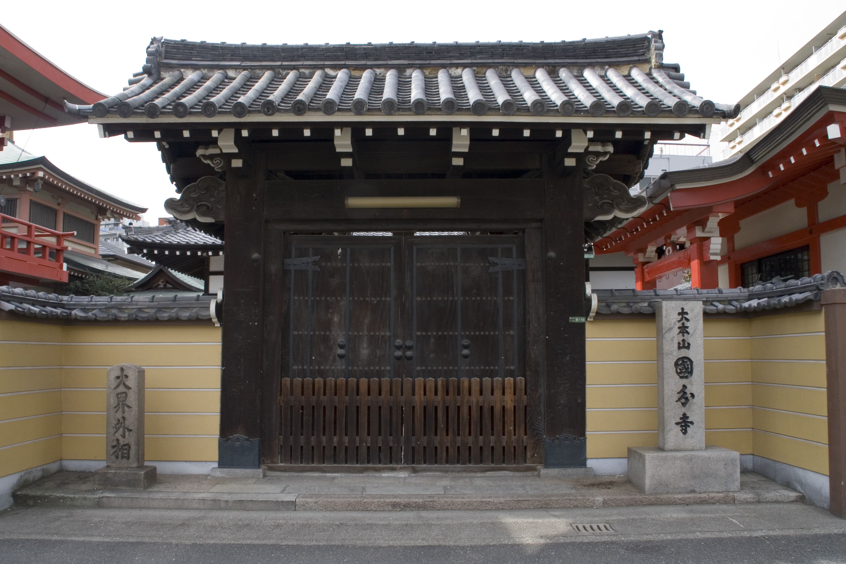 国分寺（大阪市北区）